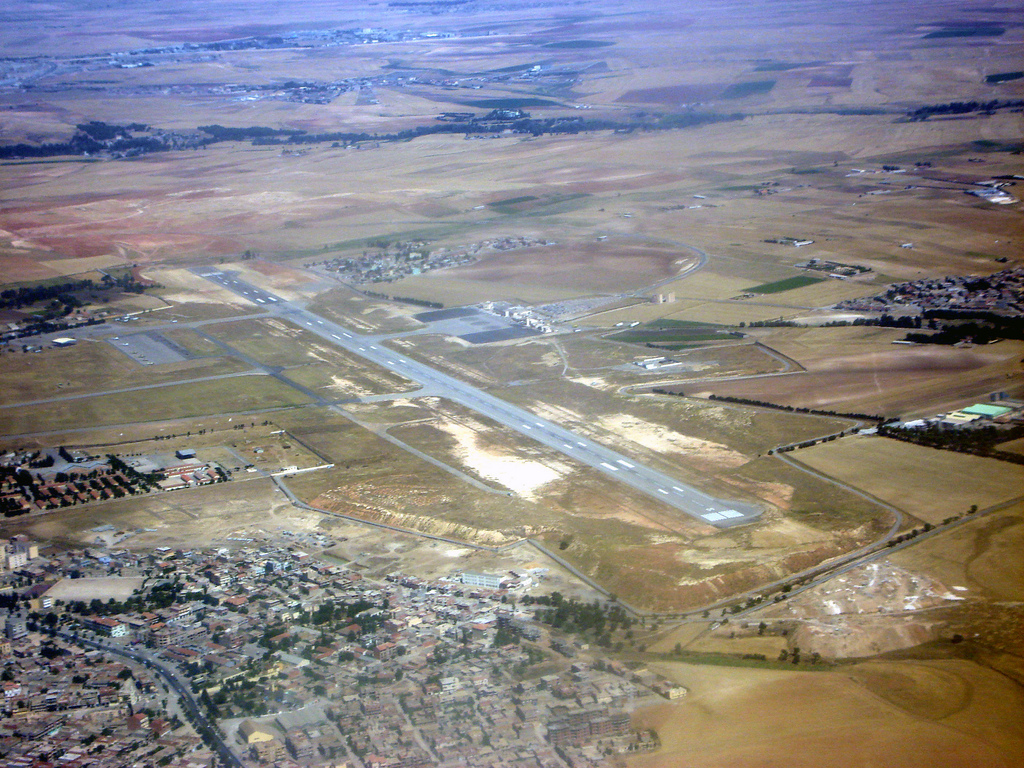 L'aéroport de Sétif sur lequel nous allons nous poser.